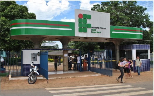 Foto frontal do câmpus Urutaí do IFGoiano